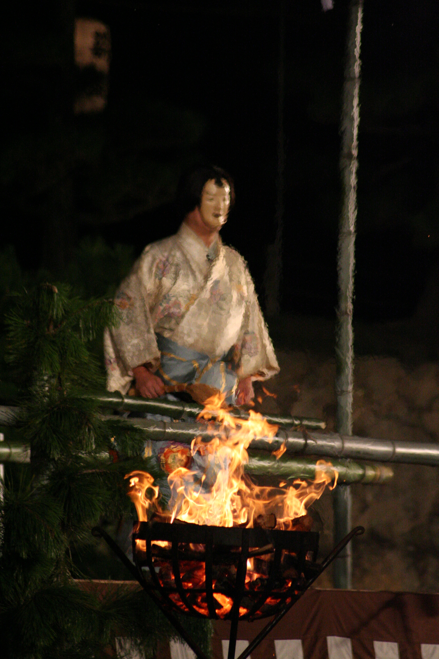 2009年7月31日に姫路城三の丸広場で行なわれた姫路薪能の様子。